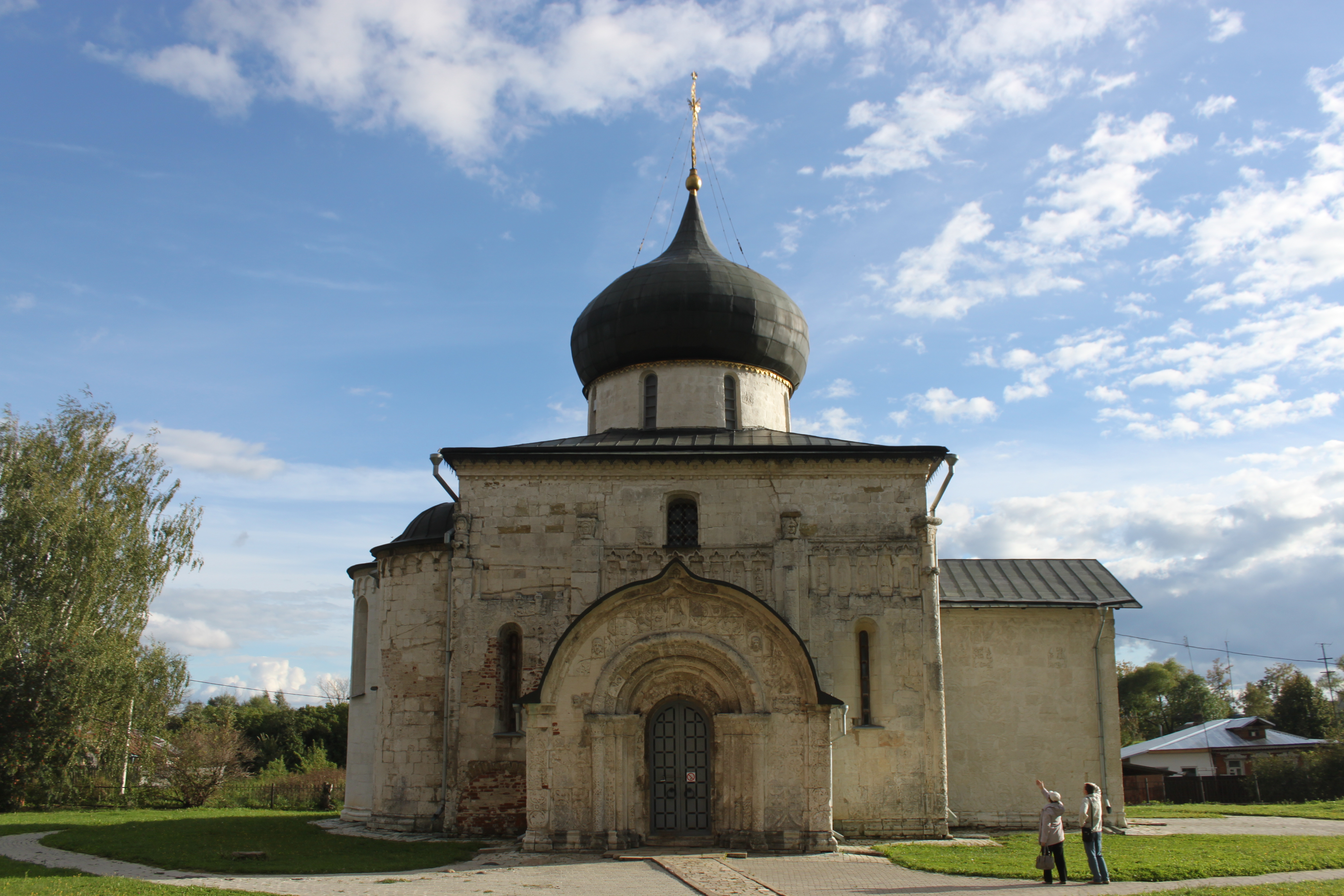 Собор Георгиевский (Георгиевский собор и земляные валы городища): улица 1 Мая, Юрьев-Польский, Юрьев-Польский район, Владимирская область